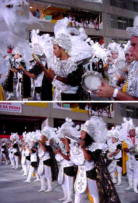 Recordar é Viver - Carnaval Rio de Janeiro 2003 São Clemente - Carnaval 2003 - Campeã no Acesso A Enredo: Mangaratiba, uma História de Lutas para todos que Amam a Terra e a Liberdade Carnavalesco: Lane Santana